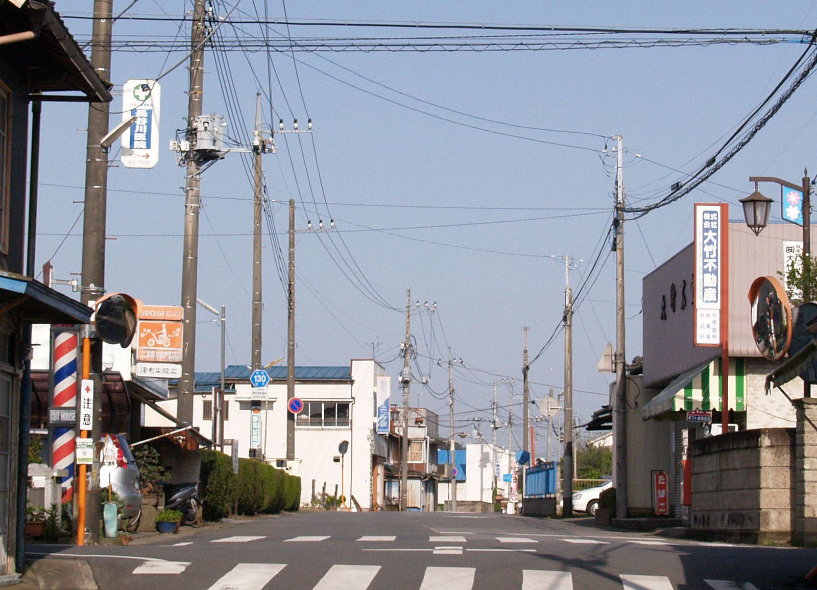 栃木県道130号静和停車場線